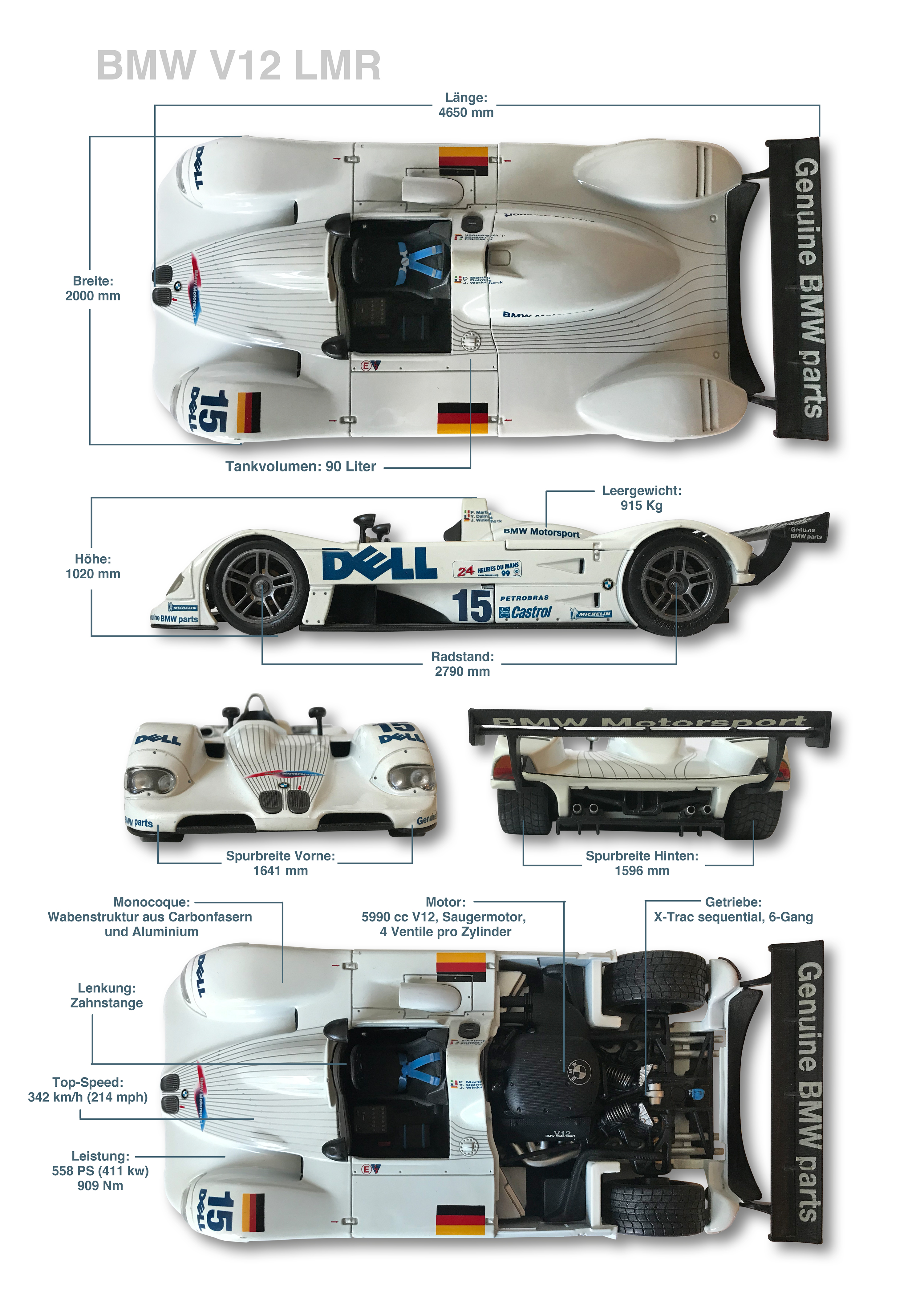 Grafisch aufbereitete Basis-Informationen zum BMW V12 LMR